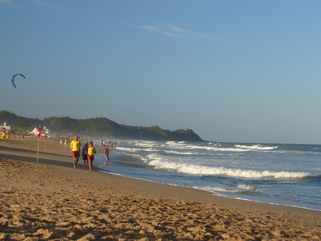 Praia dos Amores - SC